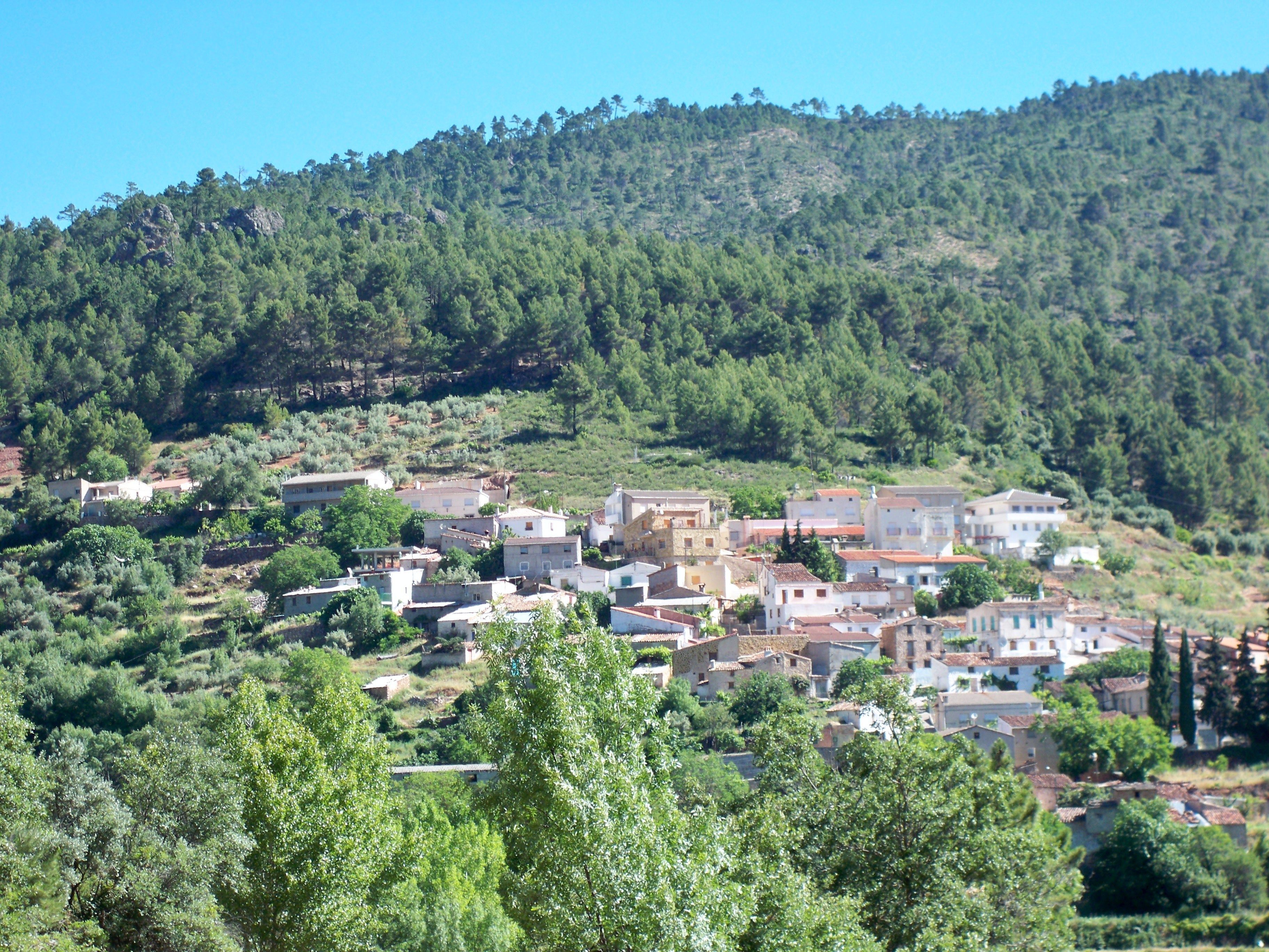 Vista de la localidad de La Alfera (Molinicos - Albacete)